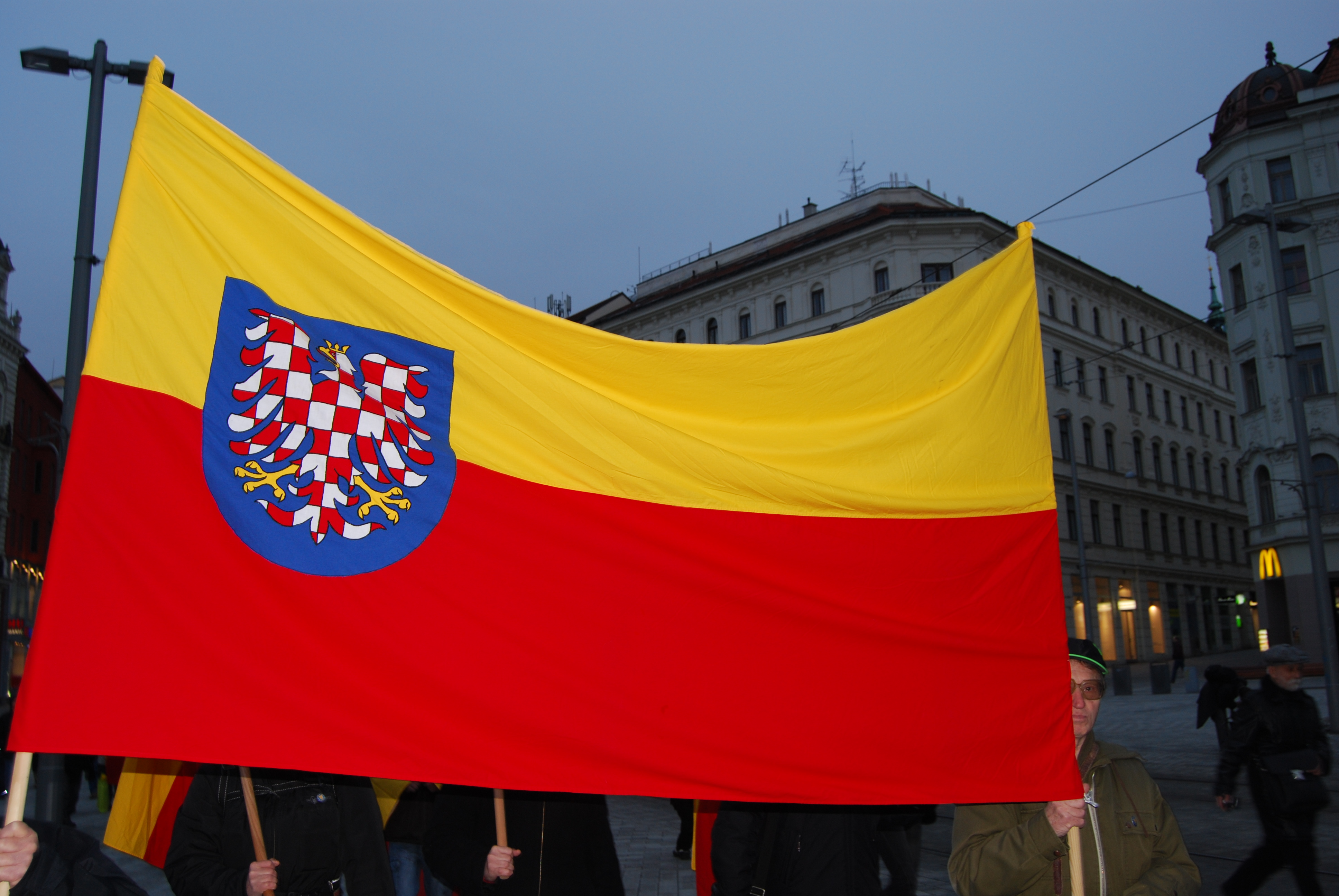 Moravská vlajka používaná příznivci Moravského hnutí